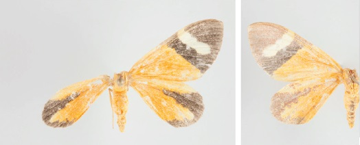 Hagnagora mirandahenrichae